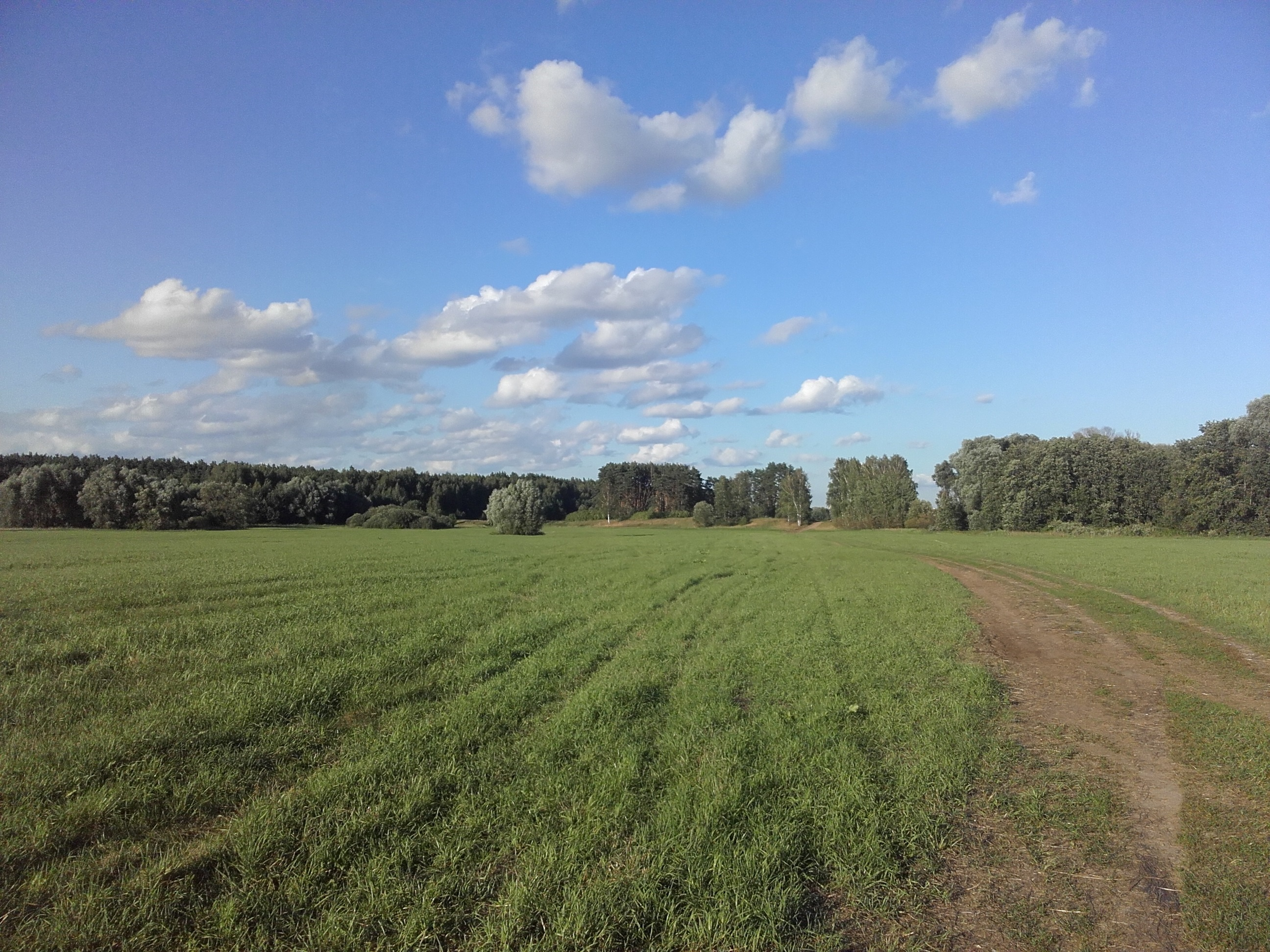 На Лохином острове